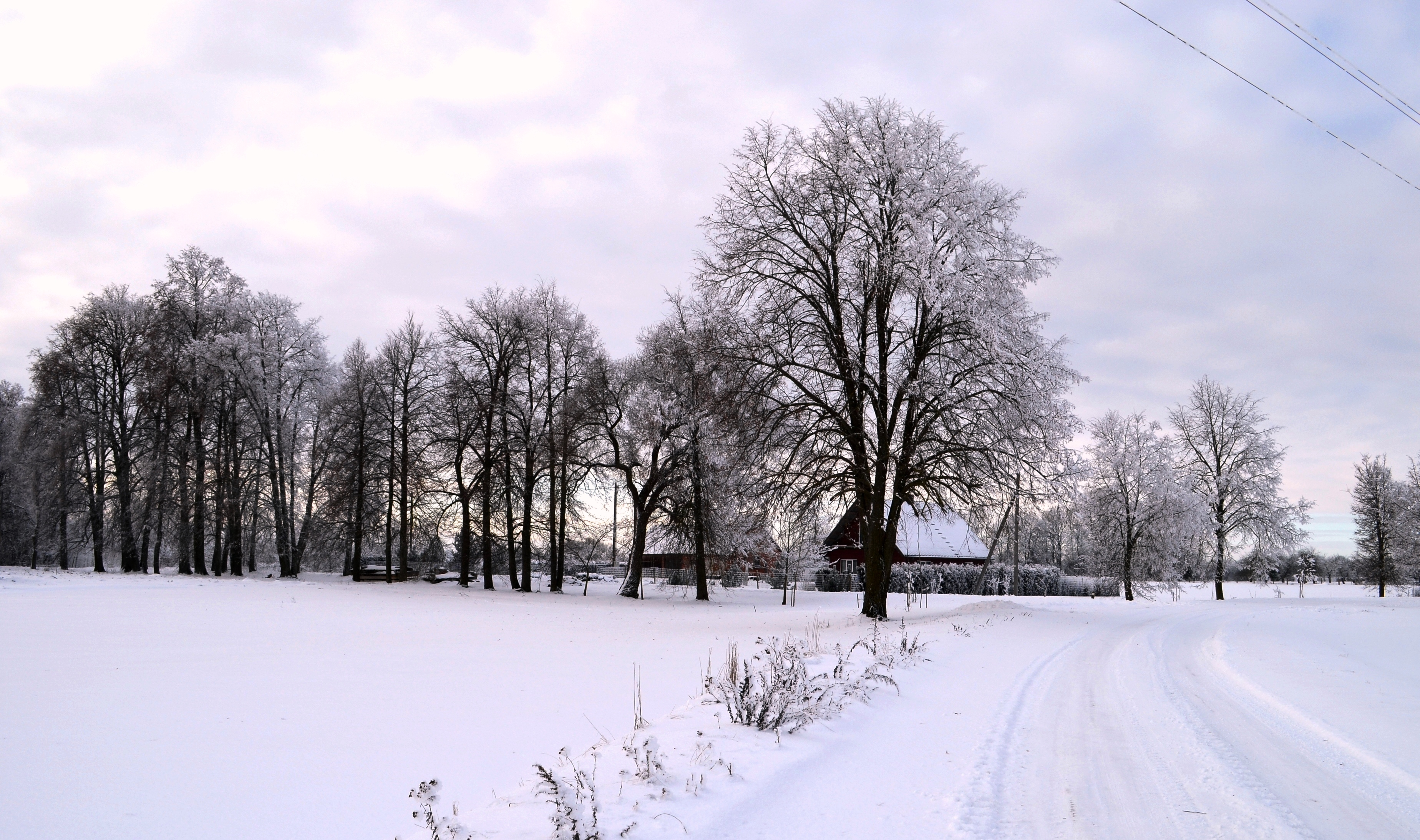 Šiaudinė, Kėdainių rajonas